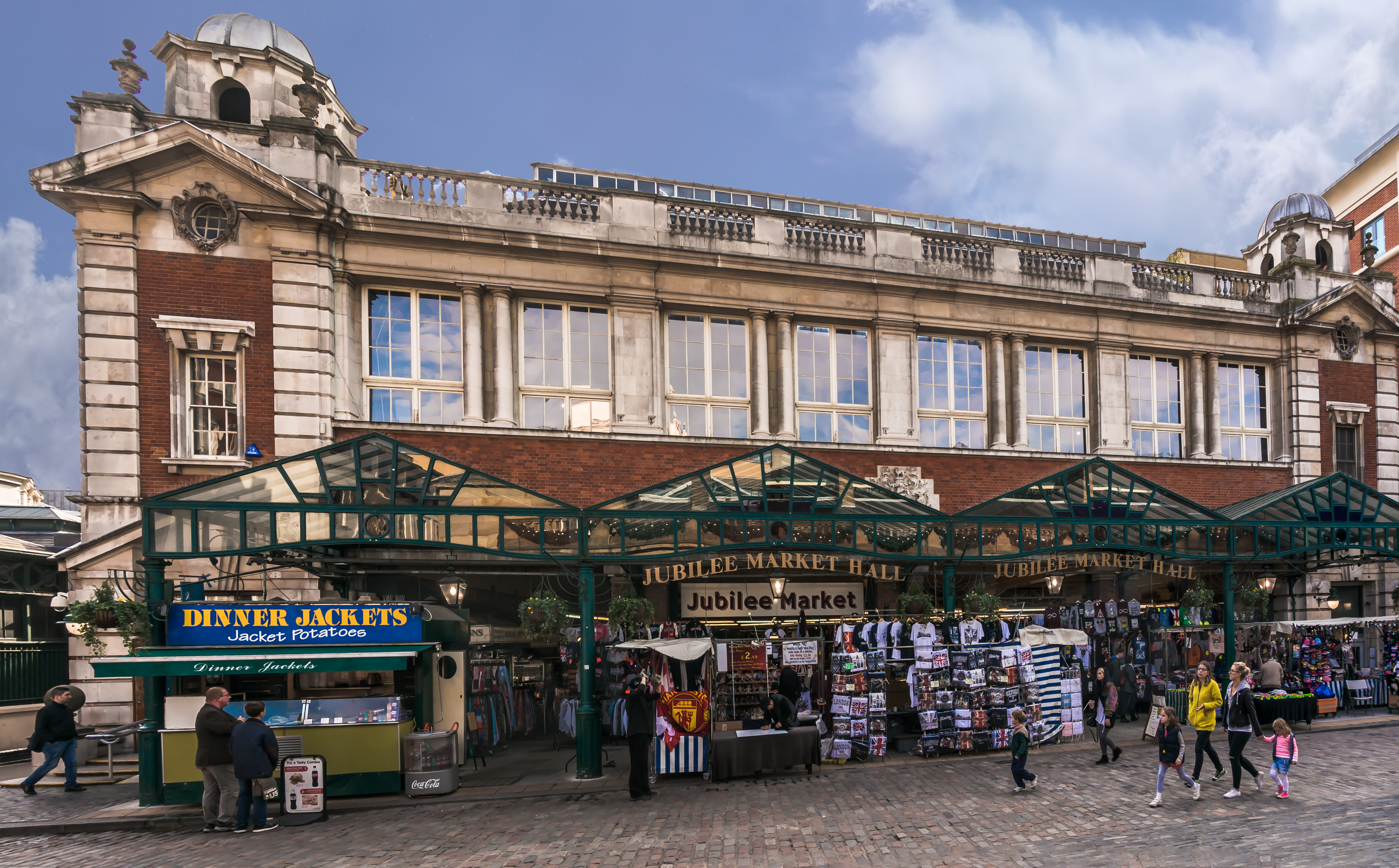 Jubilee Market, Covent Garden, London